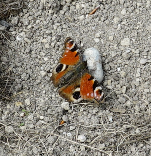 dans la Réserve naturelle régionale du marais les trous de Leu.